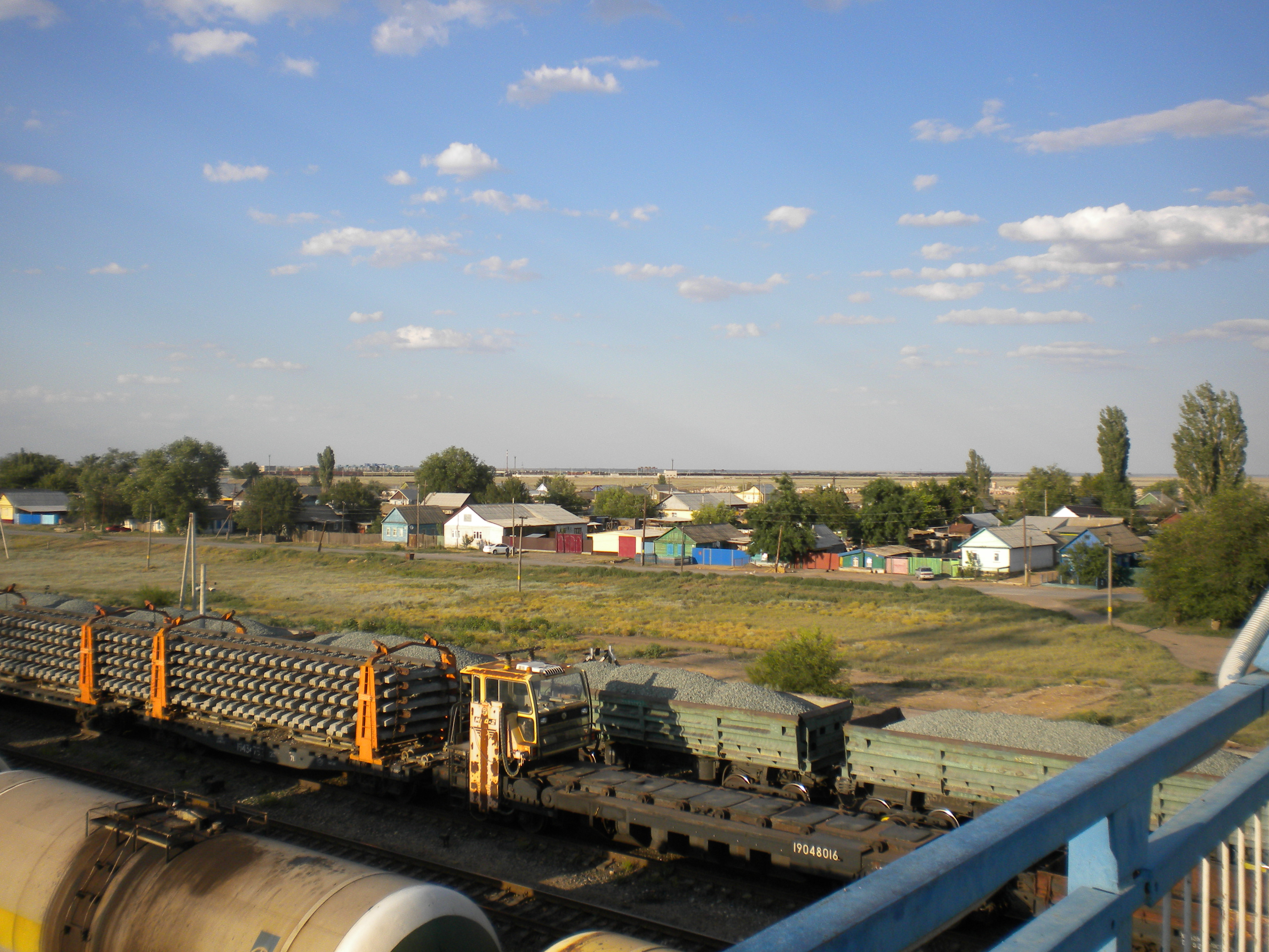 Верхний Баскунчак. Вид на посёлок со стороны пешеходного моста.